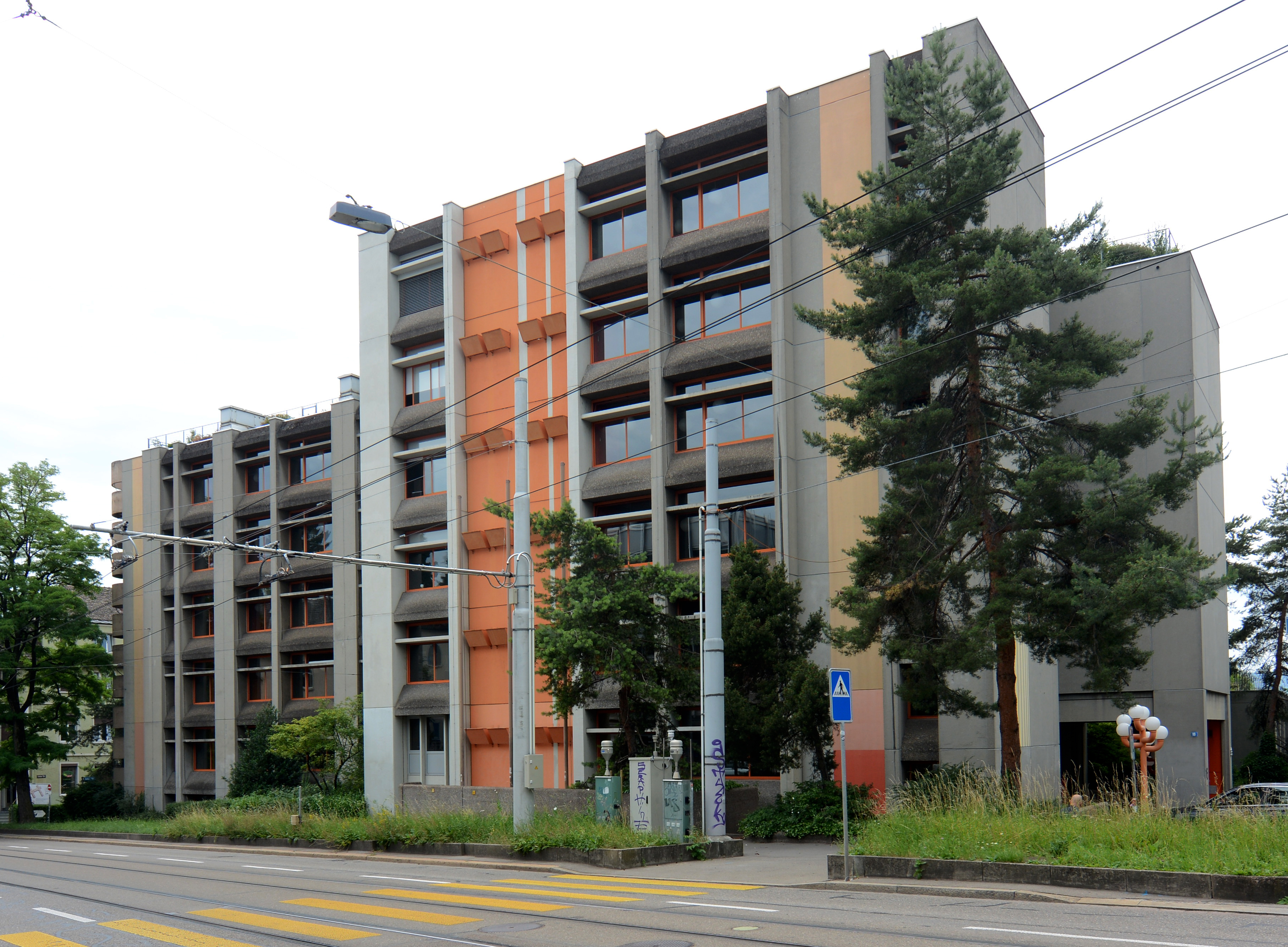 Das Gewerbeschulhaus für die Abteilung Verkaufspersonal, Zürich-Unterstrass, 1967–73. Architekten: Rudolf und Esther Guyer.